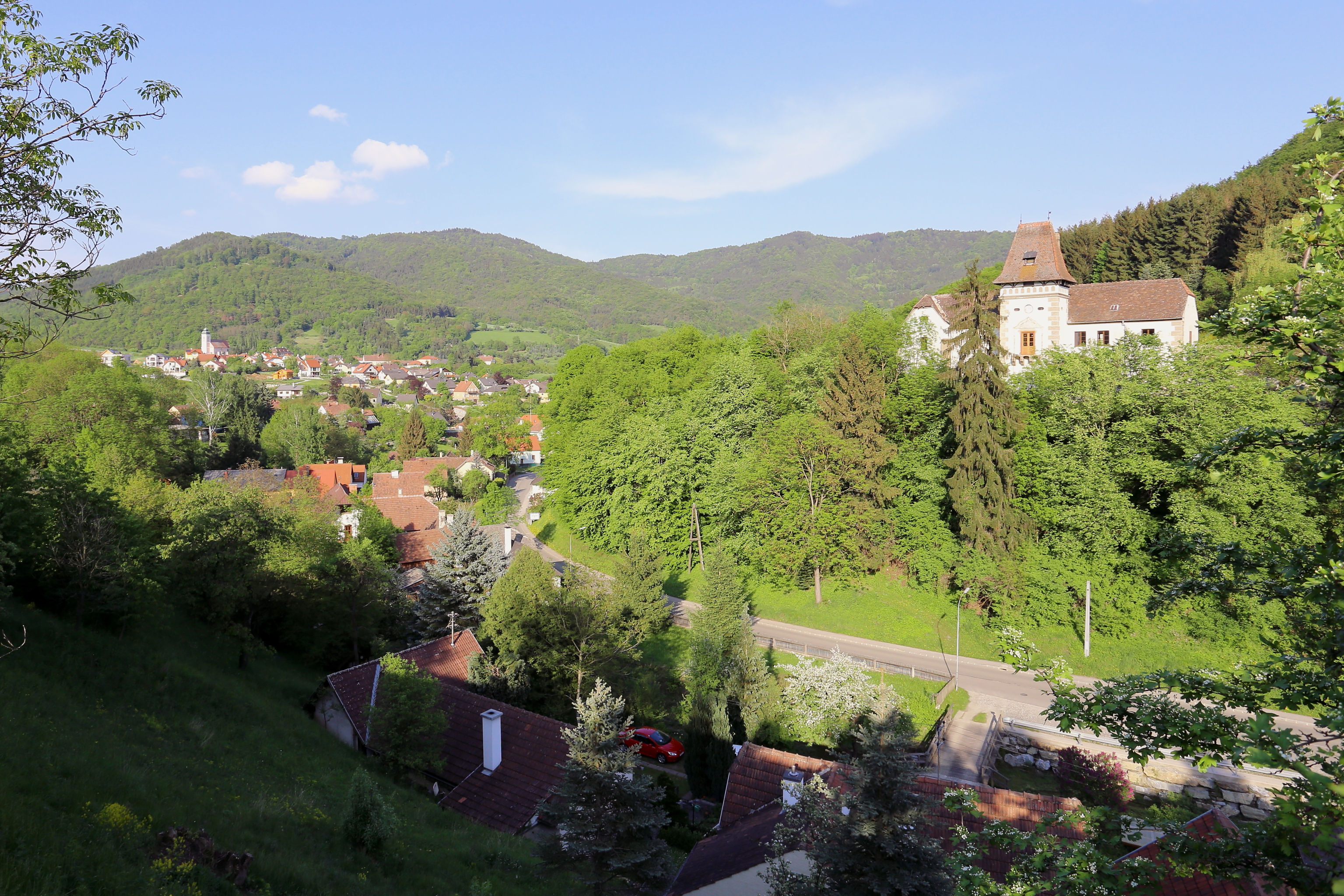 Blick vom Ortsteil Ötz Richtung Mühldorf. Links hinten der Ortsteil Niederranna mit Kirche und rechts der Trenninghof.